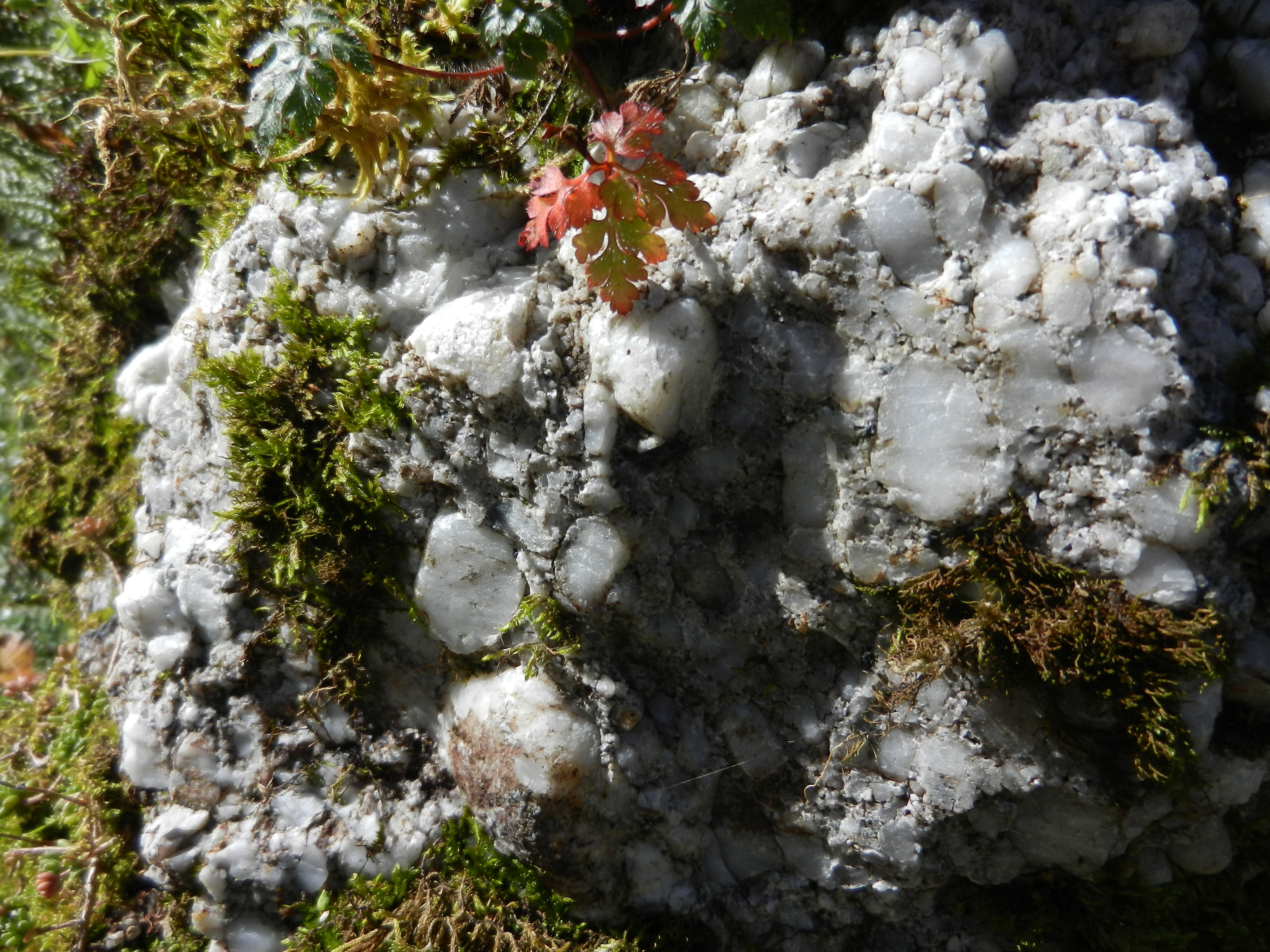 Kremenov konglomerat v Dovžanovi soteski.